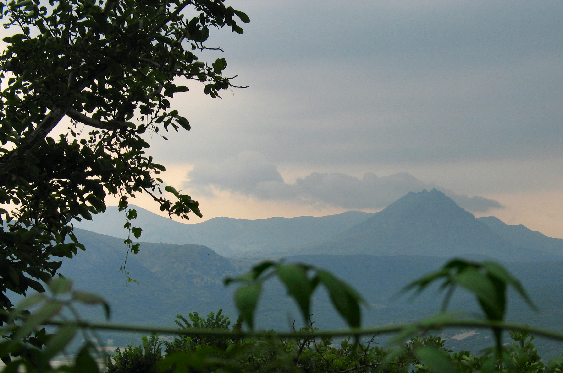 Gokceada